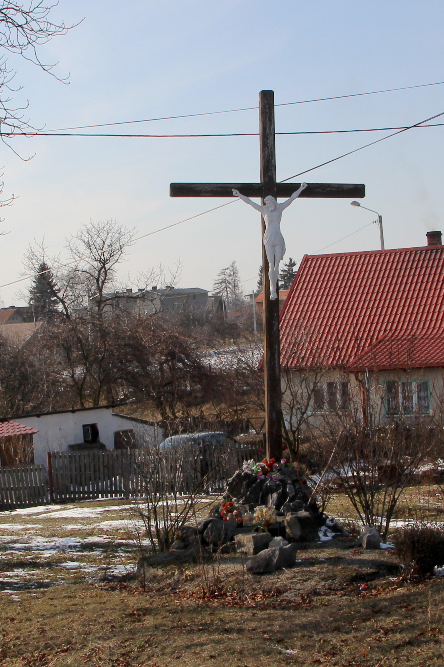 Krzyż przydrożny w Nadziejowie – wieś w Polsce, w województwie opolskim, w powiecie nyskim, w gminie Otmuchów.